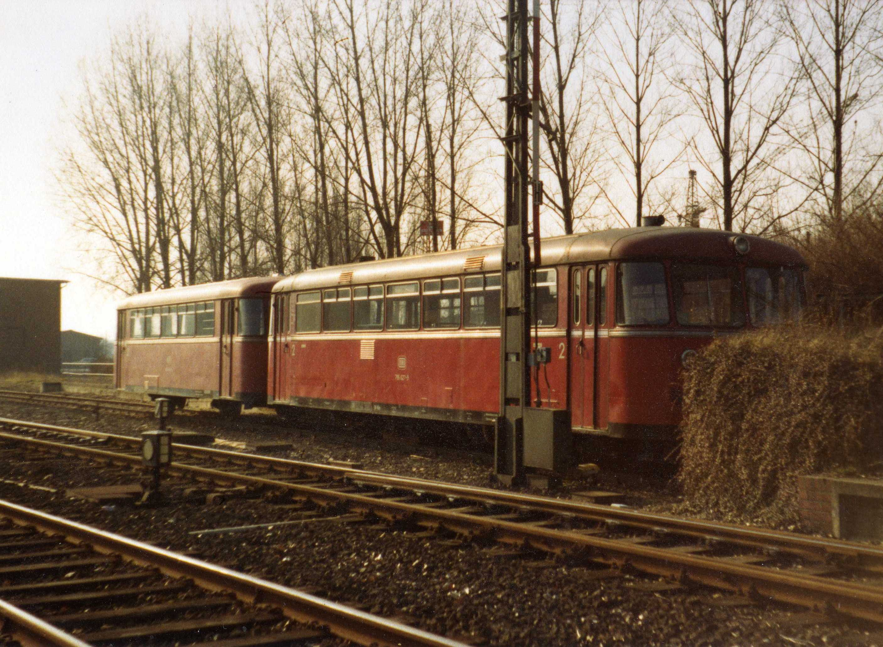 Schienenbus-Garnitur aus Motorwagen 795 627-9 und Beiwagen 995 497-5 abgestellt auf einem Gütergleis im Bahnhof Jülich, Anfang 1982. Der Beiwagen war kürzer und hatte keinen Führerstand. Diese Baureihe wurde bis Mai 1978 im Jülicher Land eingesetzt. Dieses spezielle Exemplar ging bald darauf in das Eigentum des Eisenbahn-Amateur-Klubs Jülich (EAKJ) über, welcher damit jahrelang Sonderfahrten durchführte.